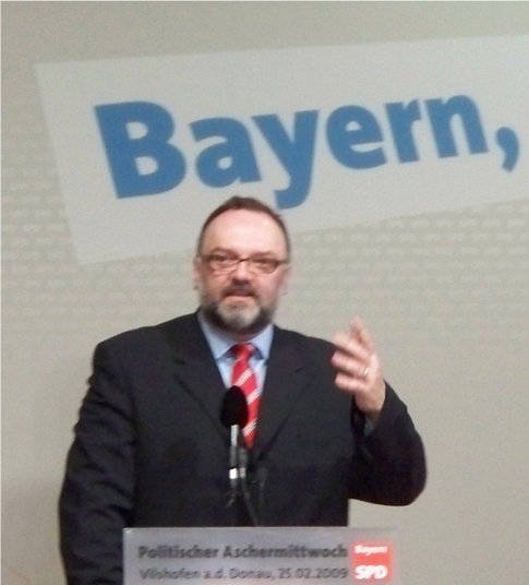 Jürgen Dupper (SPD) beim Politischen Aschermittwoch in Vilshofen an der Donau 2009.